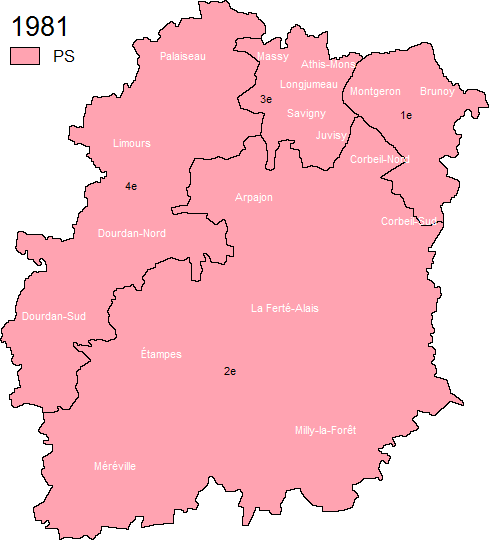 Carte électorale des circonscriptions de l'Essonne (91) en 1981.